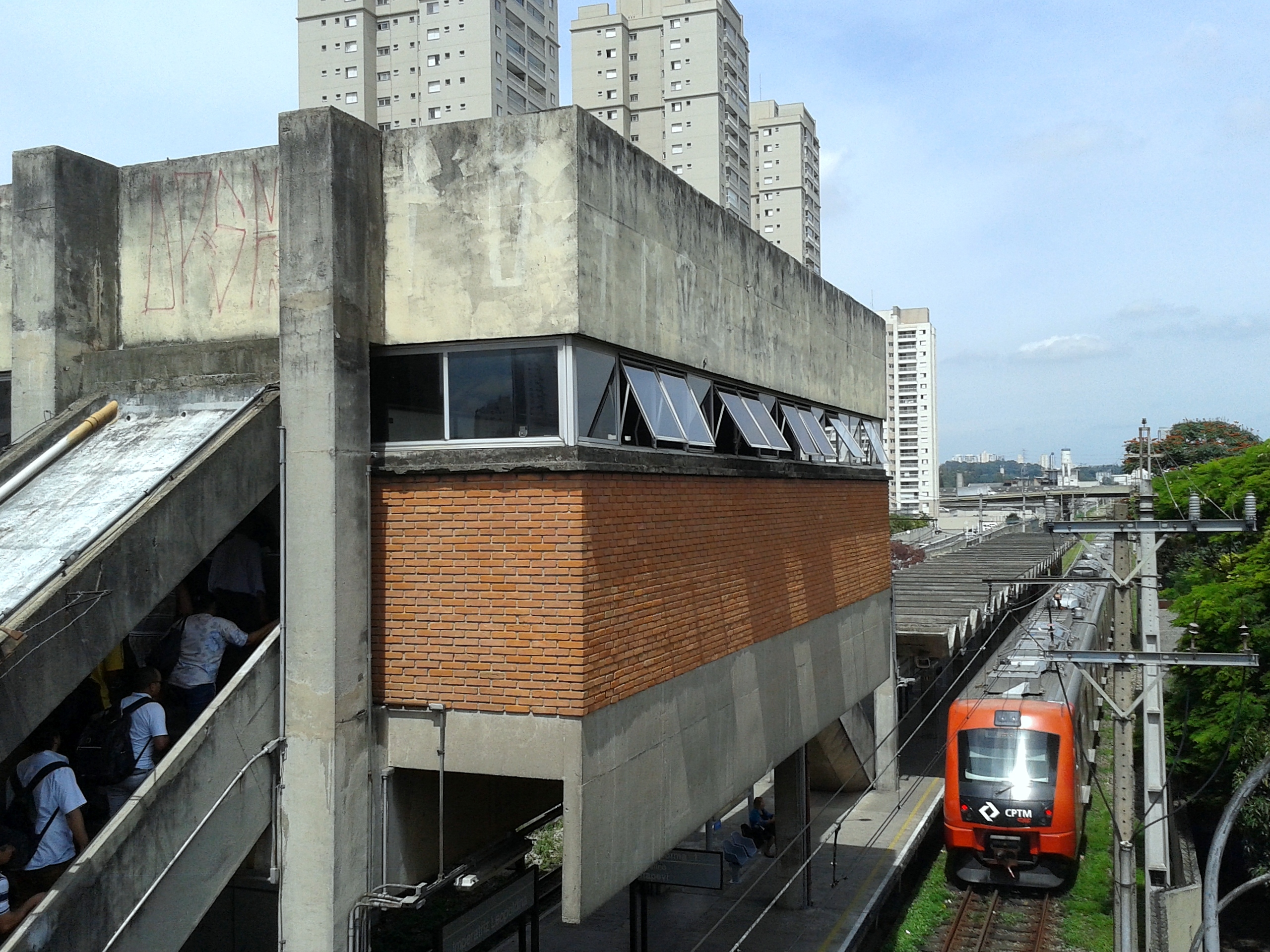 Estação Imperatriz Leopoldina da CPTM. Distrito de Vila Leopoldina, São Paulo, SP, Brasil.